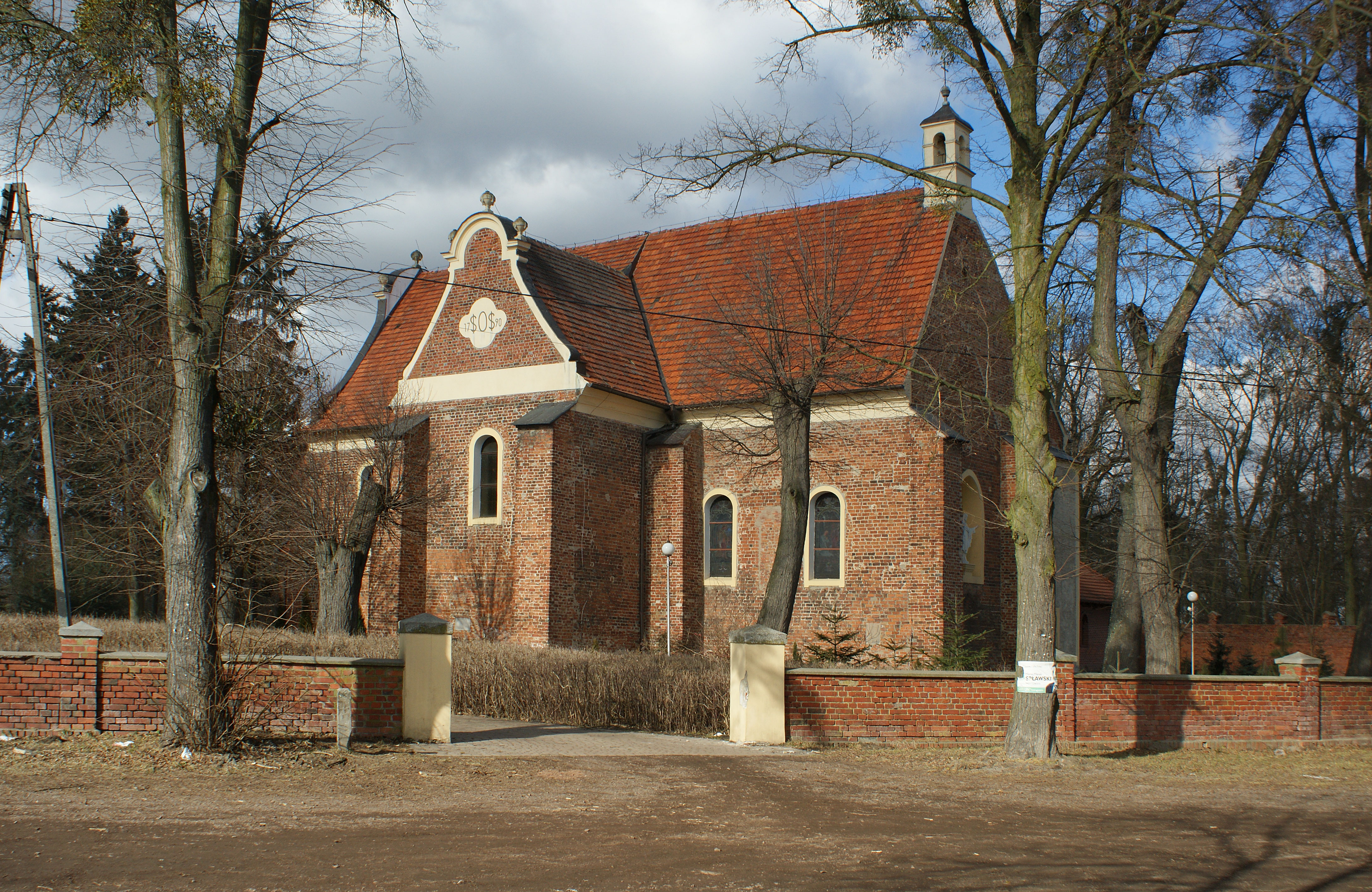 Sobótka - kościół pw. Narodzenia NMP z końca XIII w., w latach 1783-90 powiększony o transept (zabytek nr kl-IV-73/64/53)